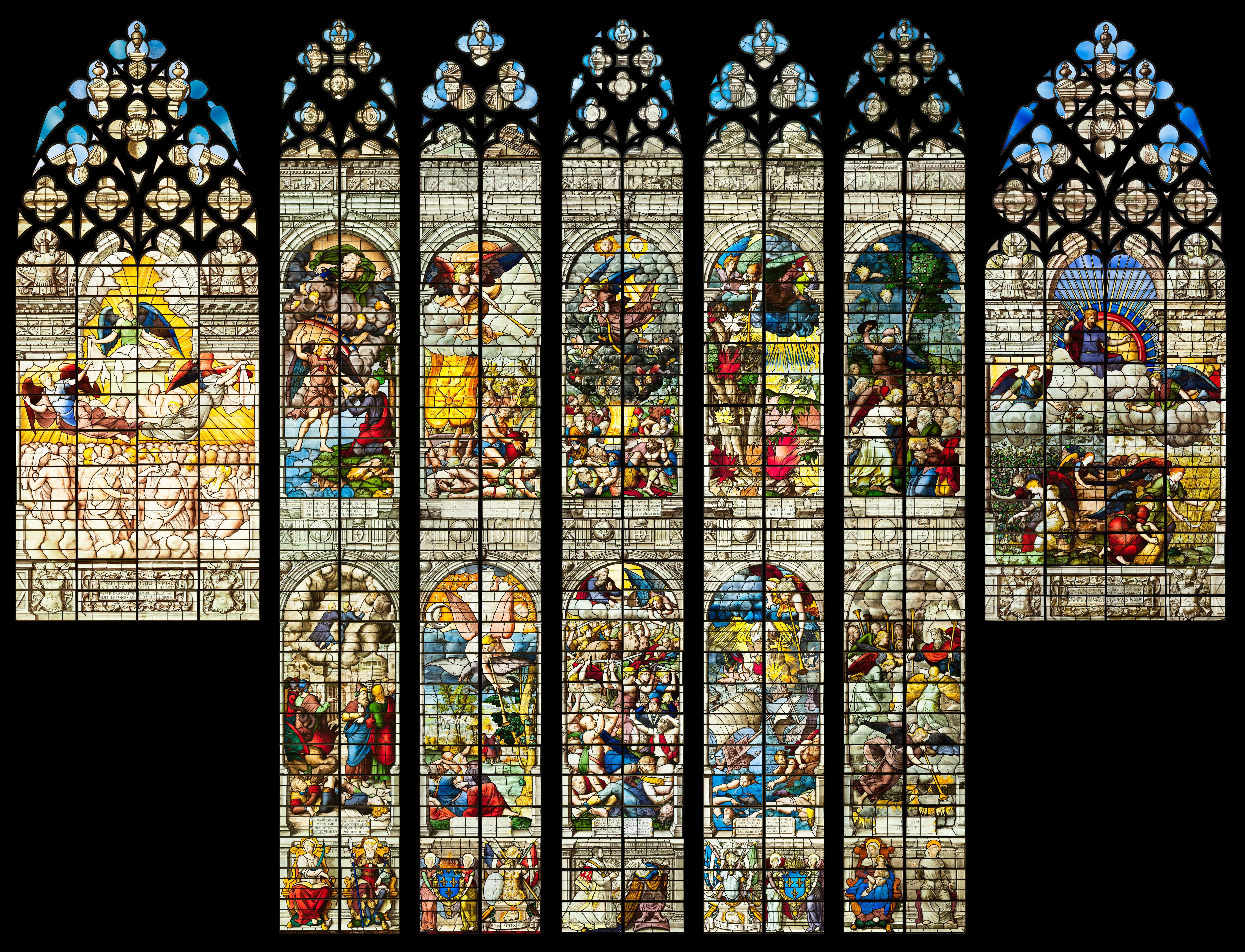 Montage associant plusieurs prises de vue.